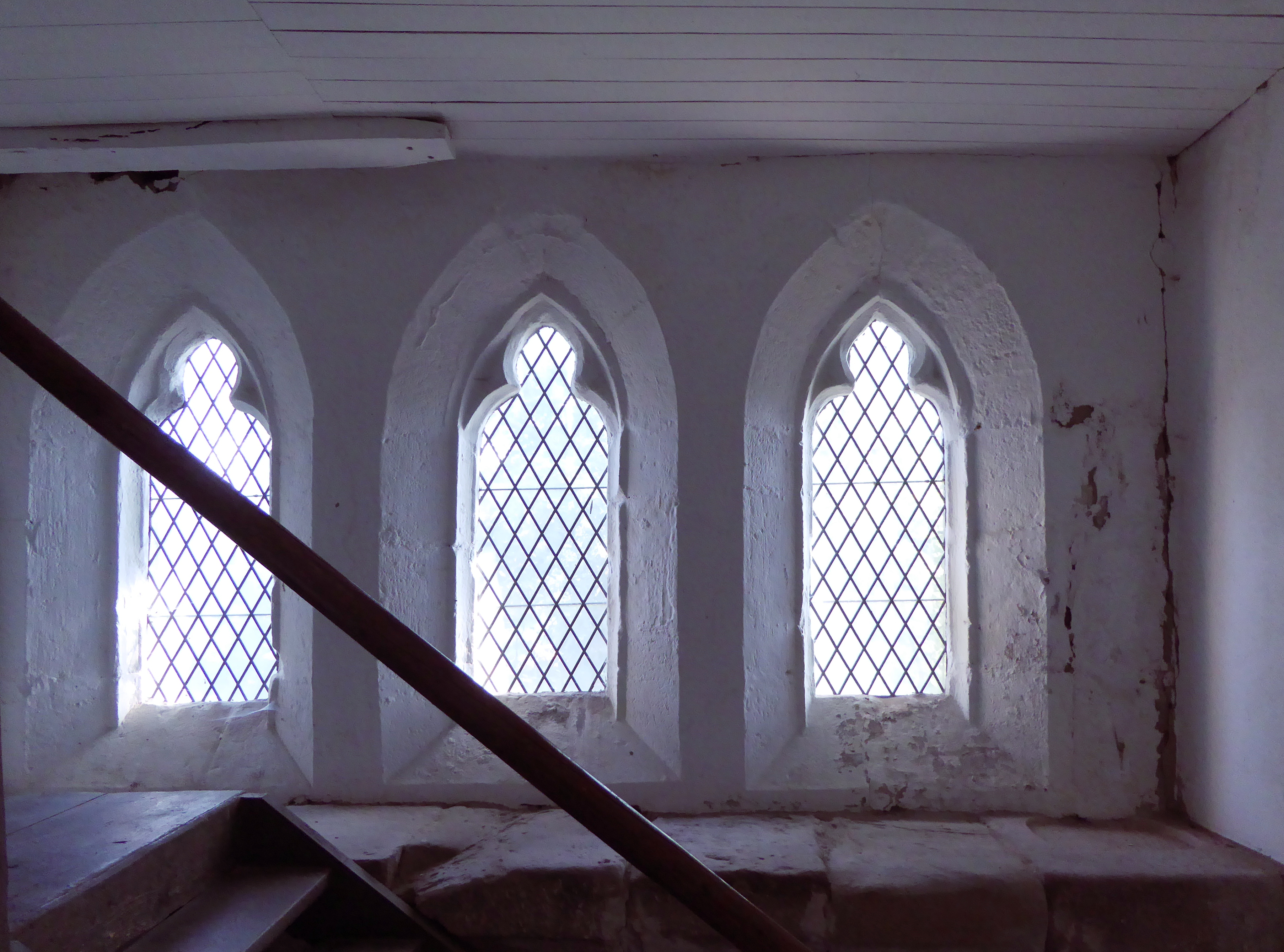 Fenster der Mauritius-(Moritz-)Kapelle über dem Eingangsbereich der ehemaligen Klosterkirche St. Christophorus in Reinhausen, Gemeinde Gleichen, Südniedersachsen. In der Bauphase um 1290/1322 in gotischer Form zum romanischen Kirchenbau ergänzt.